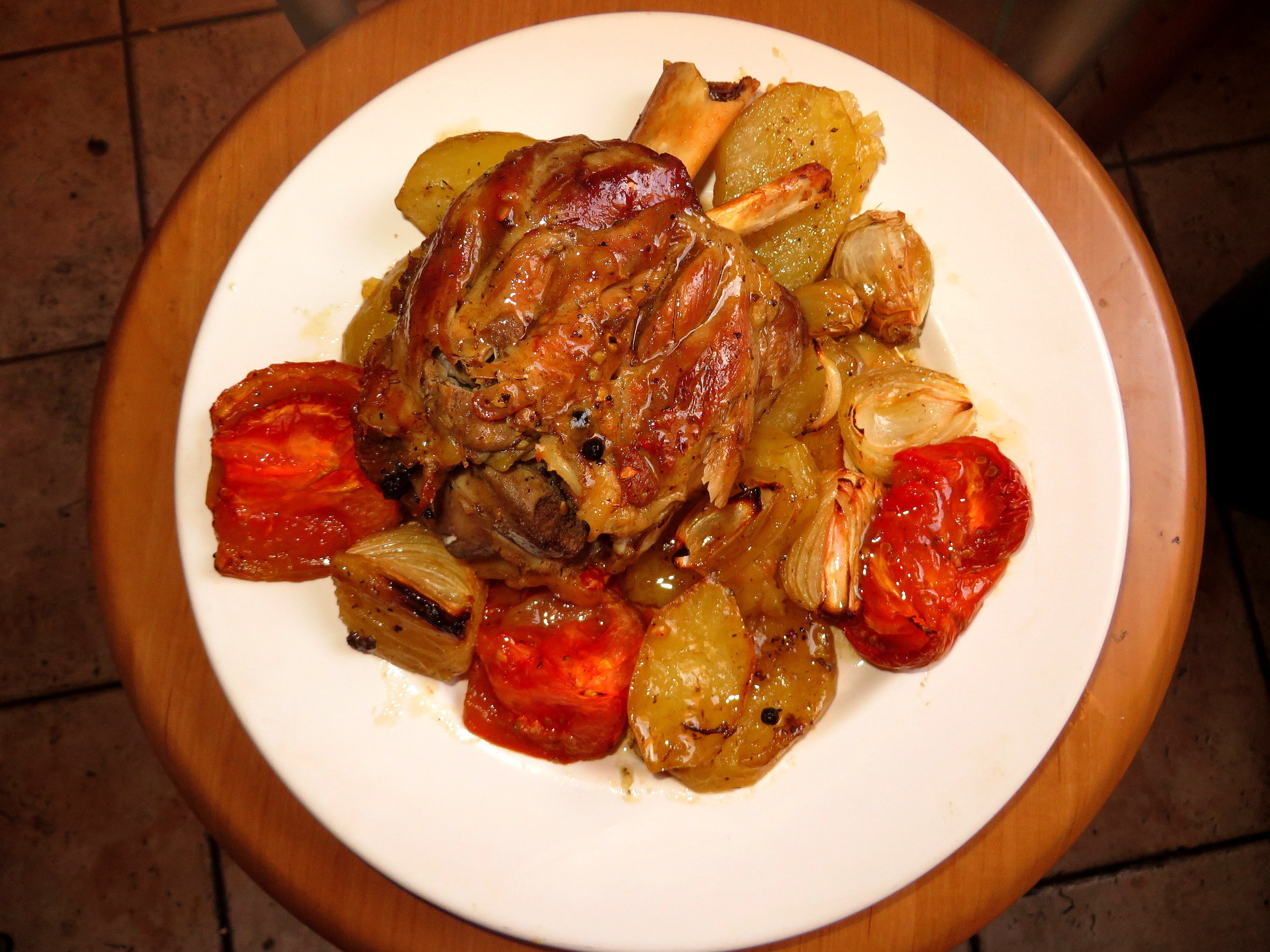 Codillo asado con patatas